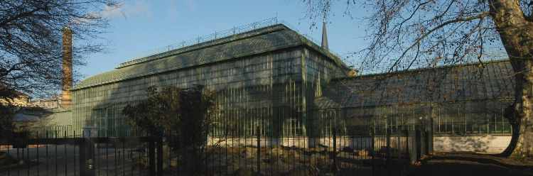 Sonnenuhrhaus in Schoenbrunn